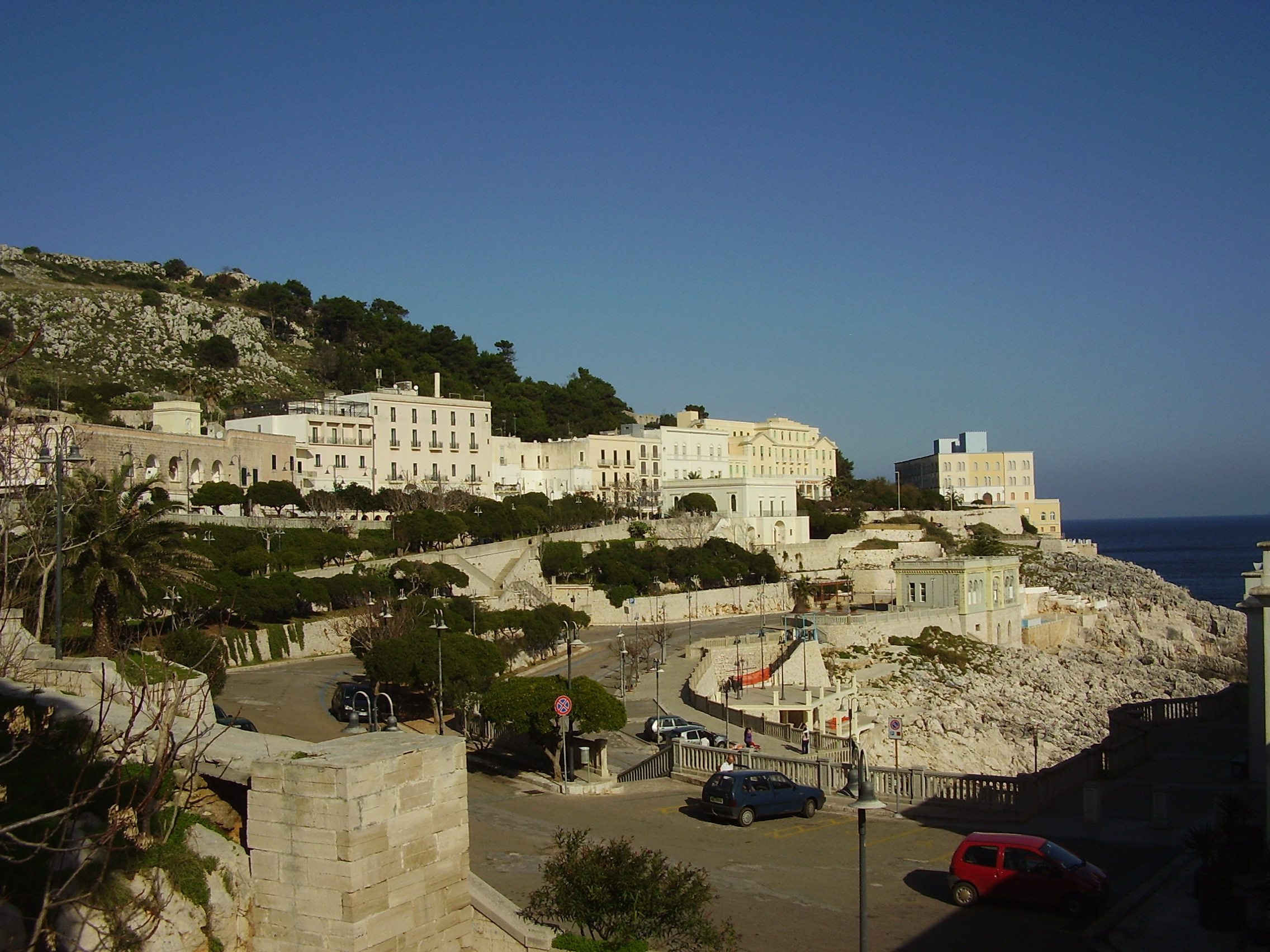 Panorama di Santa Cesarea Terme da Villa Sticchi